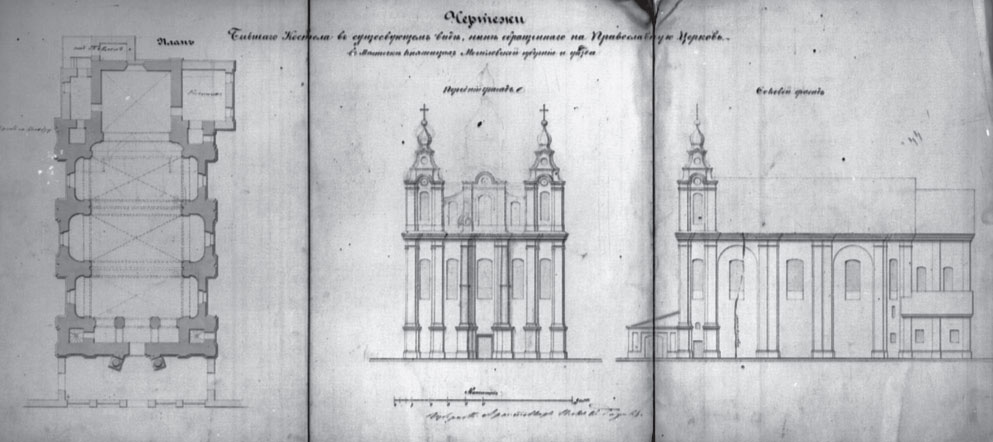 Беларуская (тарашкевіца): Княжыцы (Kniažycy). Касьцёл Сьвятога Мікалая, абмеры